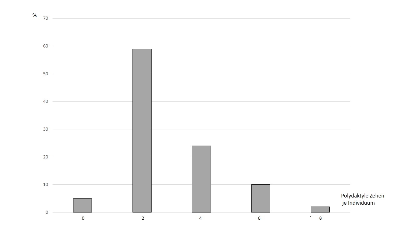 Präaxiale Polydaktylie Polymorphismus